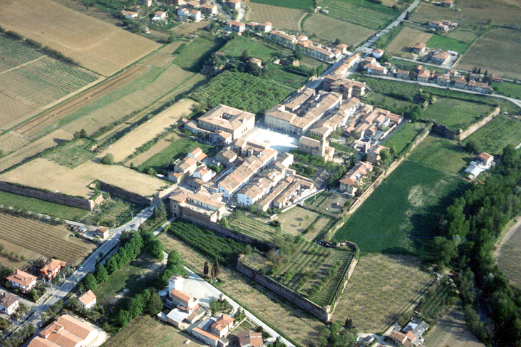 foto scattata dall'autore nella primavera del 2001 con volo su cesna privato